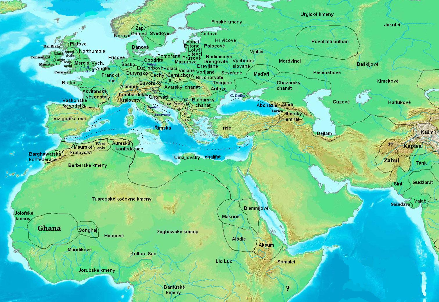 Eastern Hemisphere in 700 AD in Czech.